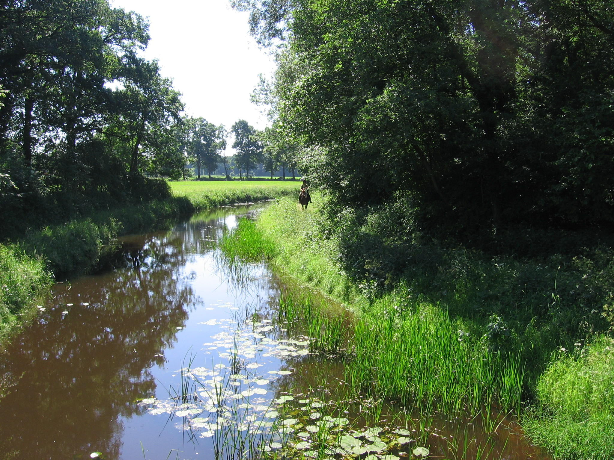 Dit is een foto van de Hagmolenbeek zoals ik die zelf genomen heb op zondag 11 juni 2006.